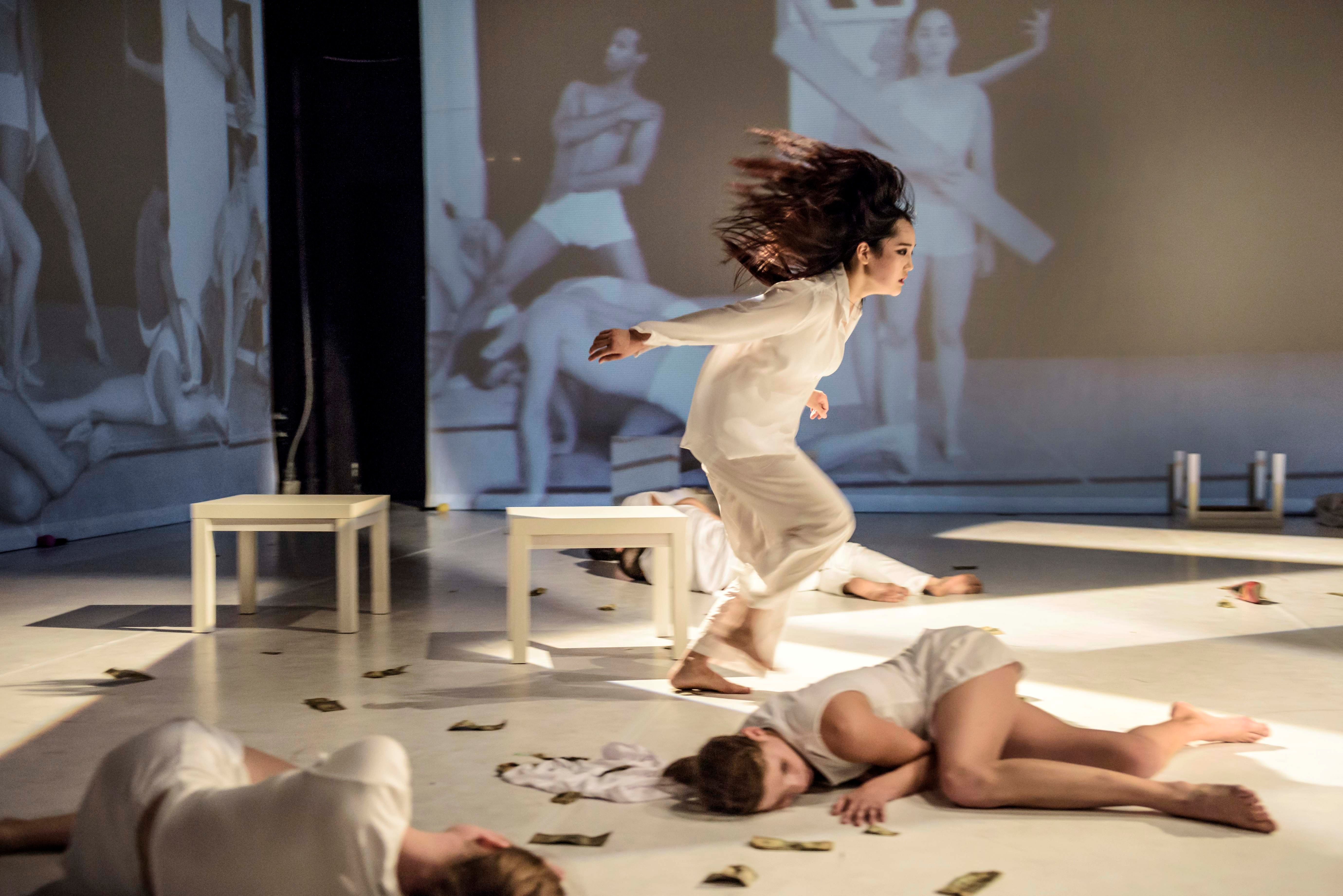 Tanztheater Erfurt - Stück: Konsequenzen